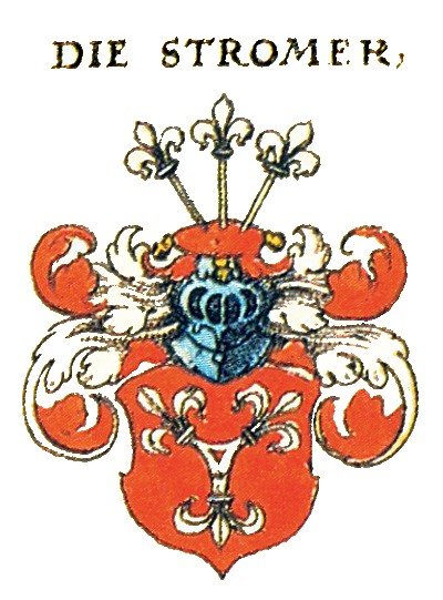 Wappen der Nürnberger Patrizierfamilie Stromer von Reichenbach